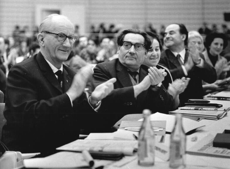 Zentralbild Franke 4.11.1966 Berlin: Abschluß der 1. Jahreskonferenz des Deutschen Schriftstellerverbandes Mit herzlichem Beifall dankten die über 350 Teilnehmer an der 1. Jahrekonferenz der Deutschen Schriftstellerkonferenz (im Vordergrund links Prof. Alfred Kurella, daneben Max Zimmering) den Diskussionsrednern, die in der Kongreßhalle am Berliner Alexanderplatz das Wort ergriffen. Vom 2. bis 4.11.1966 hatten die Delegierten und Gäste - Schriftsteller, junge Autoren, schreibende Arbeiter, Literaturwissenschaftler und Bibliothekare - über die Entwicklung der sozialistischen deutschen Nationalliteratur und die Stellung des Schriftstellers in der Gesellschaft beraten.